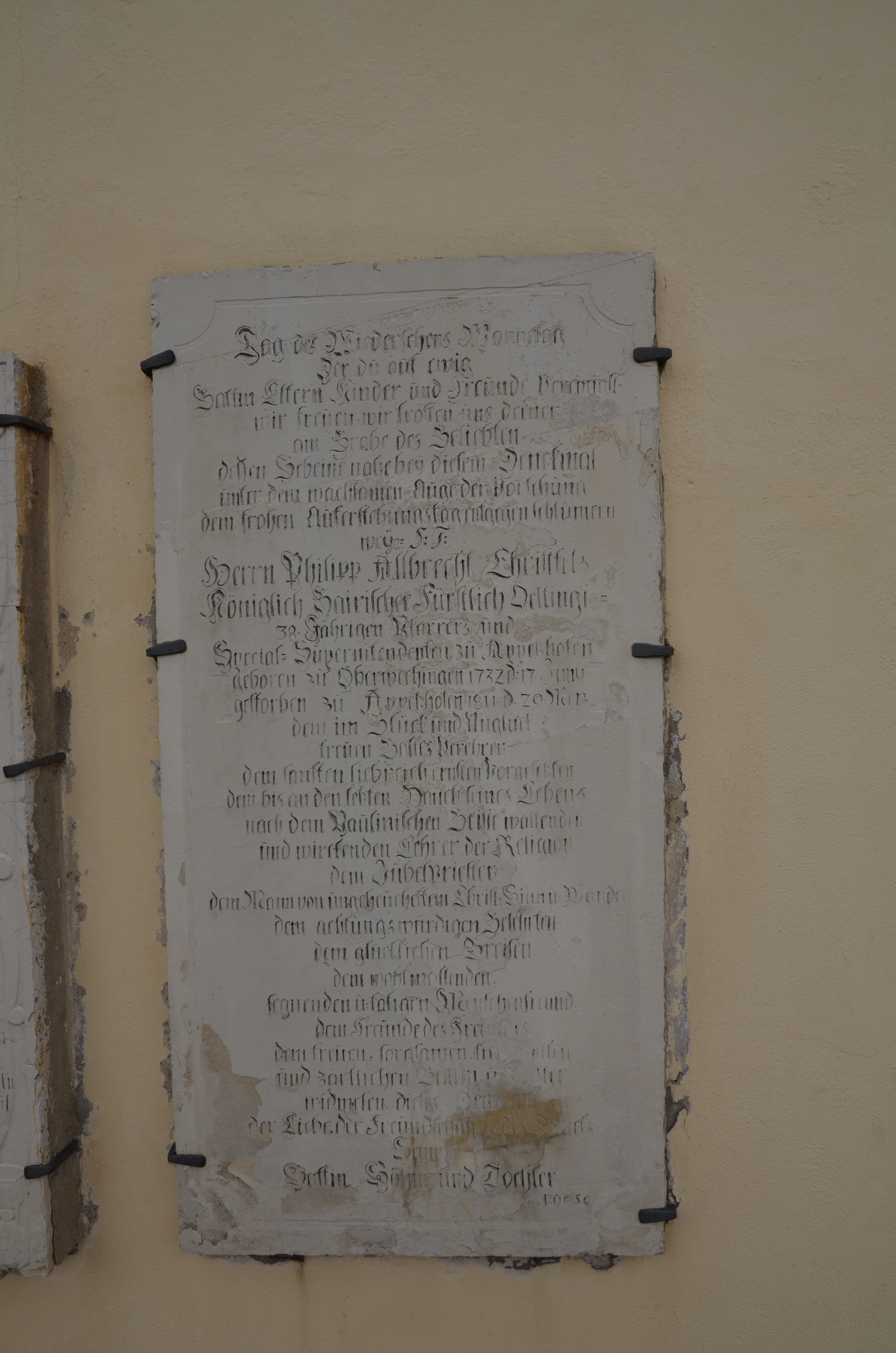 evang.-luth. Kirche St. Jakobus in Appetshofen, Epitaph an der Außenwand